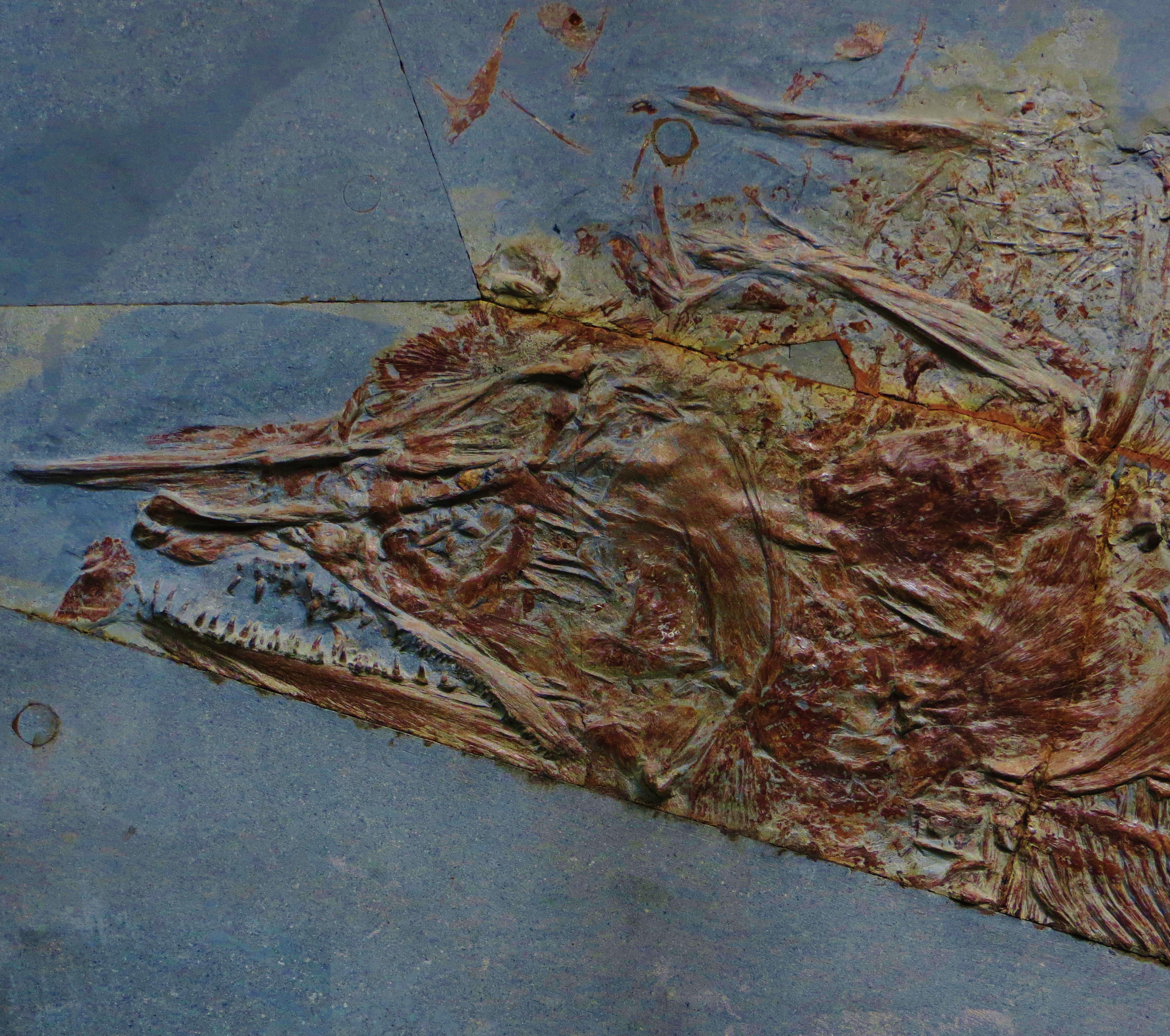 Fossil of Pachycormus, an extinct fish- Took the photo at Musee d'Histoire Naturelle, Paris